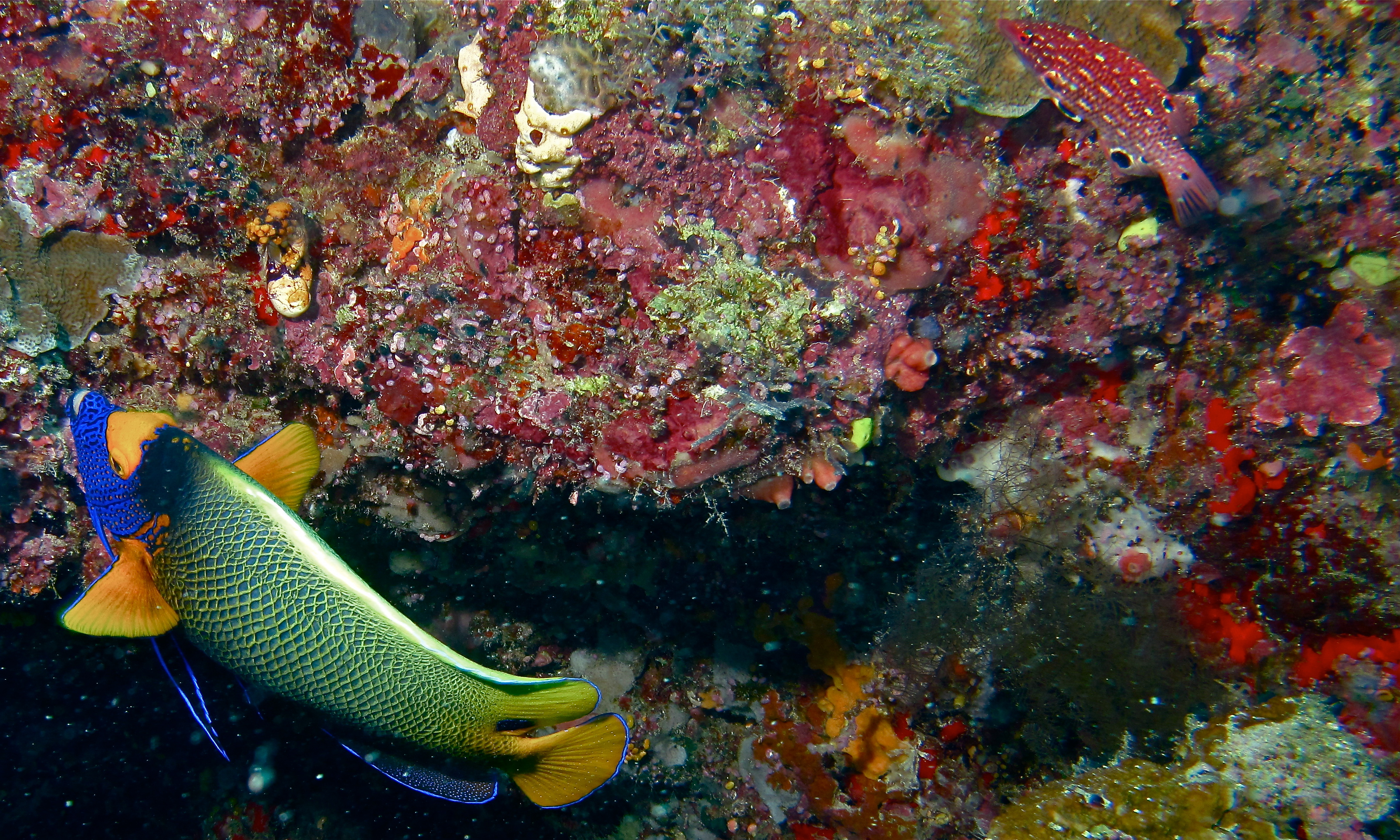 Barracuda Point, Sipadan, Sabah, MALAYSIA